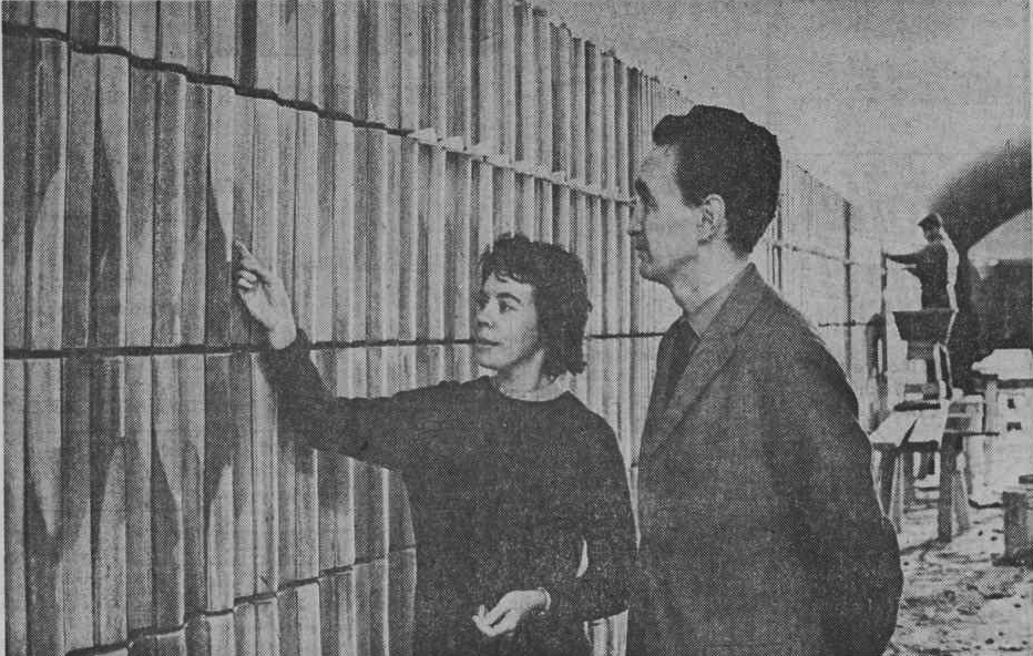 Karin Björquist & Kjell Abramson med väggbeklädnaden i keramik vid Mariatorgets tunnelbanestation